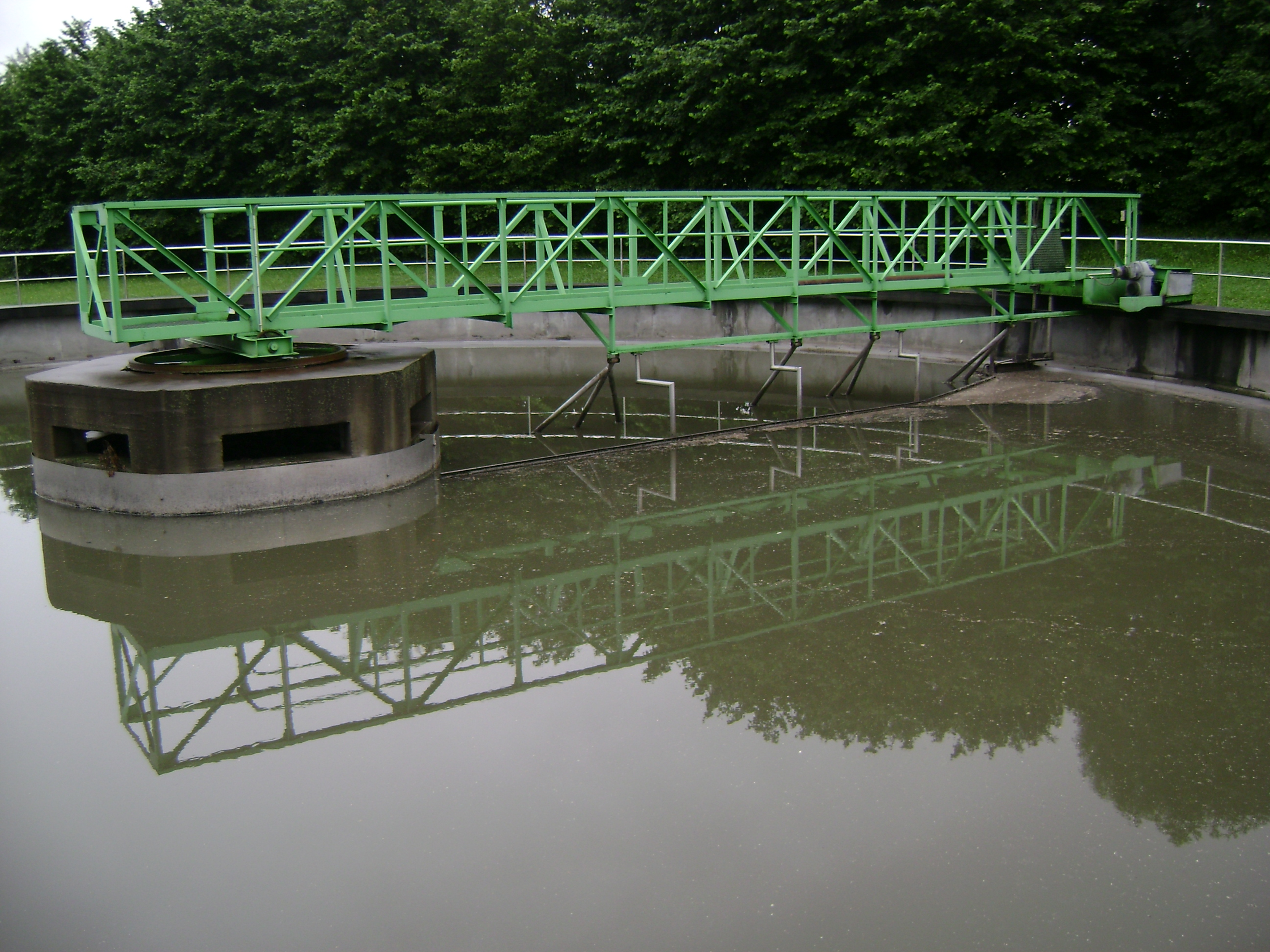 Usazovací nádrž v čističce odpadních vod v Kopřivnici